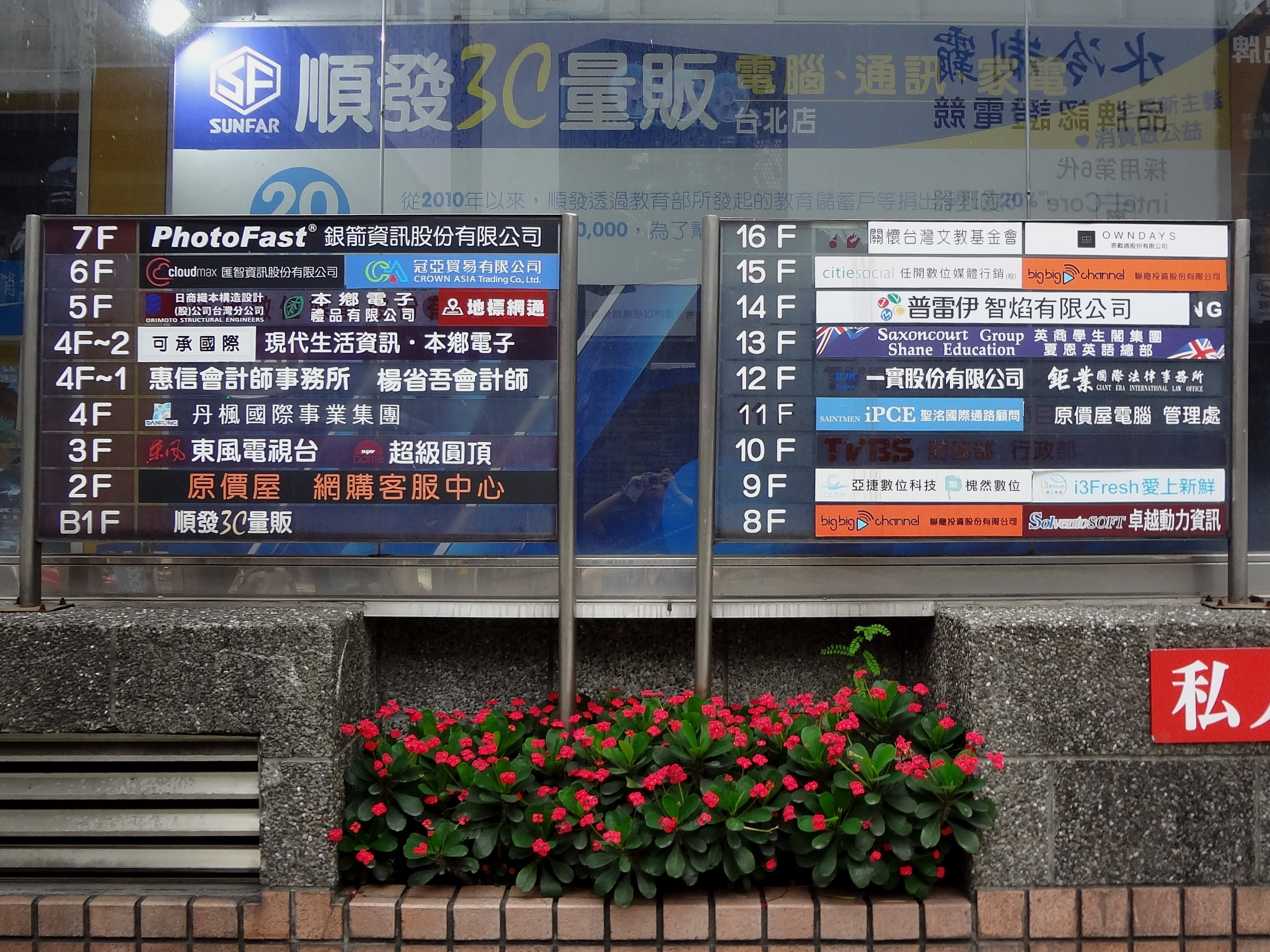 匯大大廈各樓層使用狀況圖2018年4月29日版。